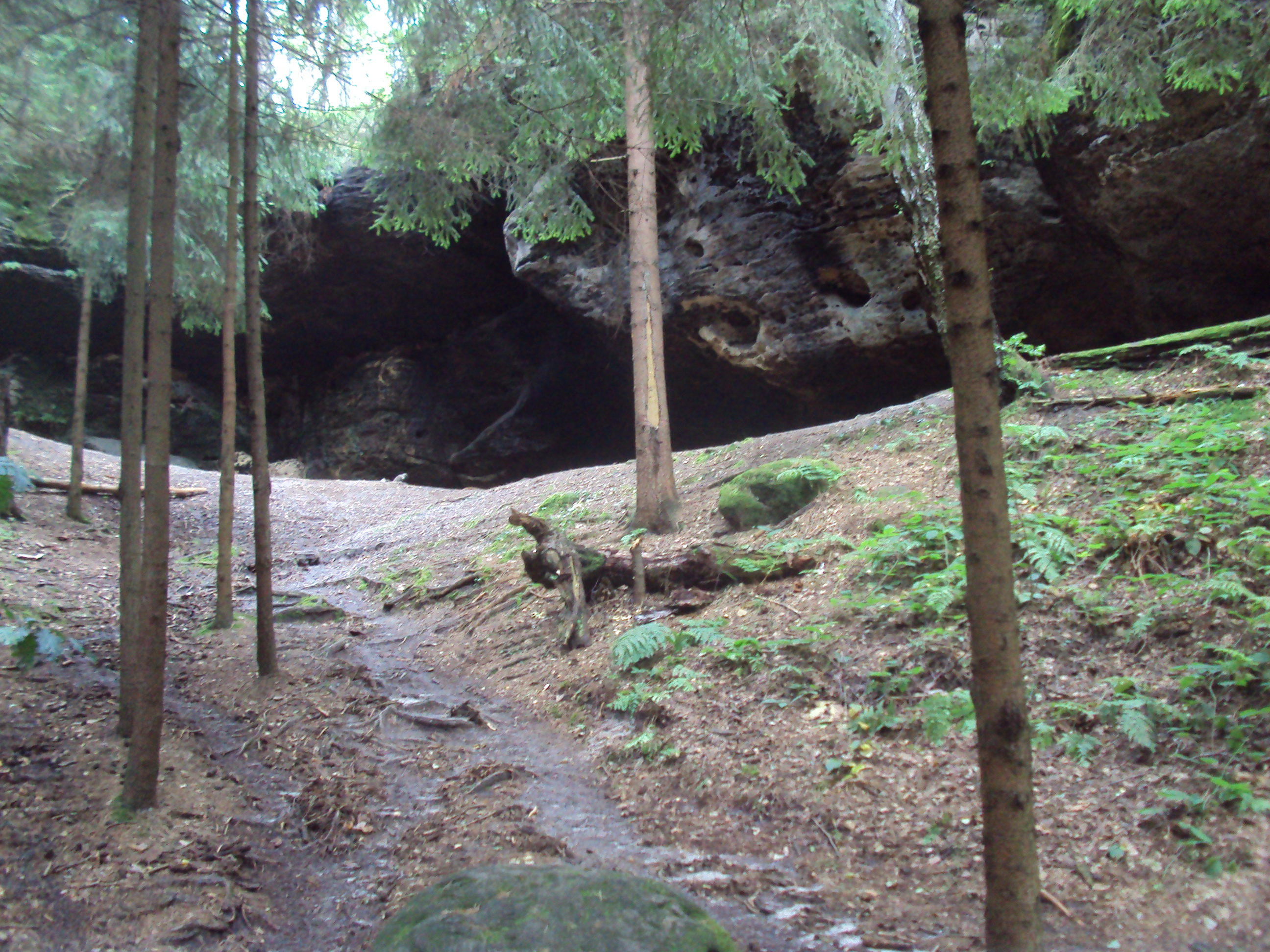 Česky: Jeskyně 3 km od Máchova jezera